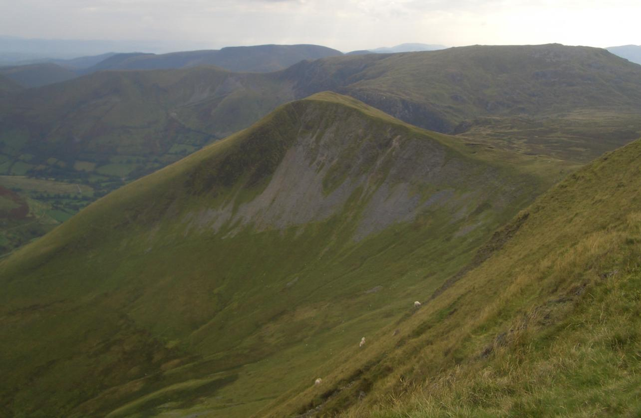 gwaun llwyni